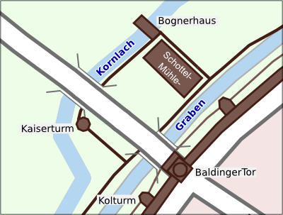 ursprünglicher Zustand des Baldinger Tors an der Nördlinger Stadtmauer, ungefähr um 1600-1700